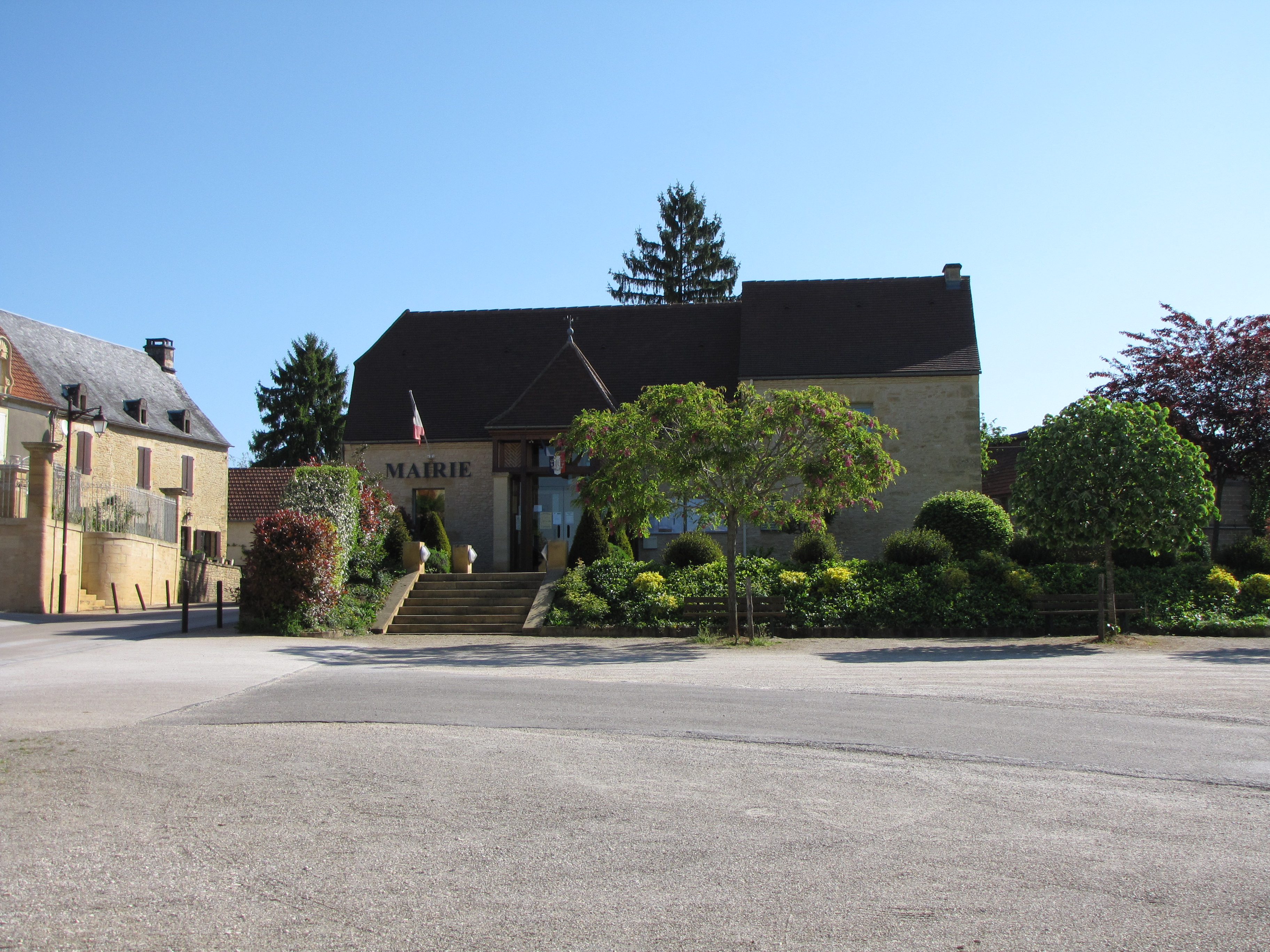 Saint-Crépin-et-Carlucet mairie